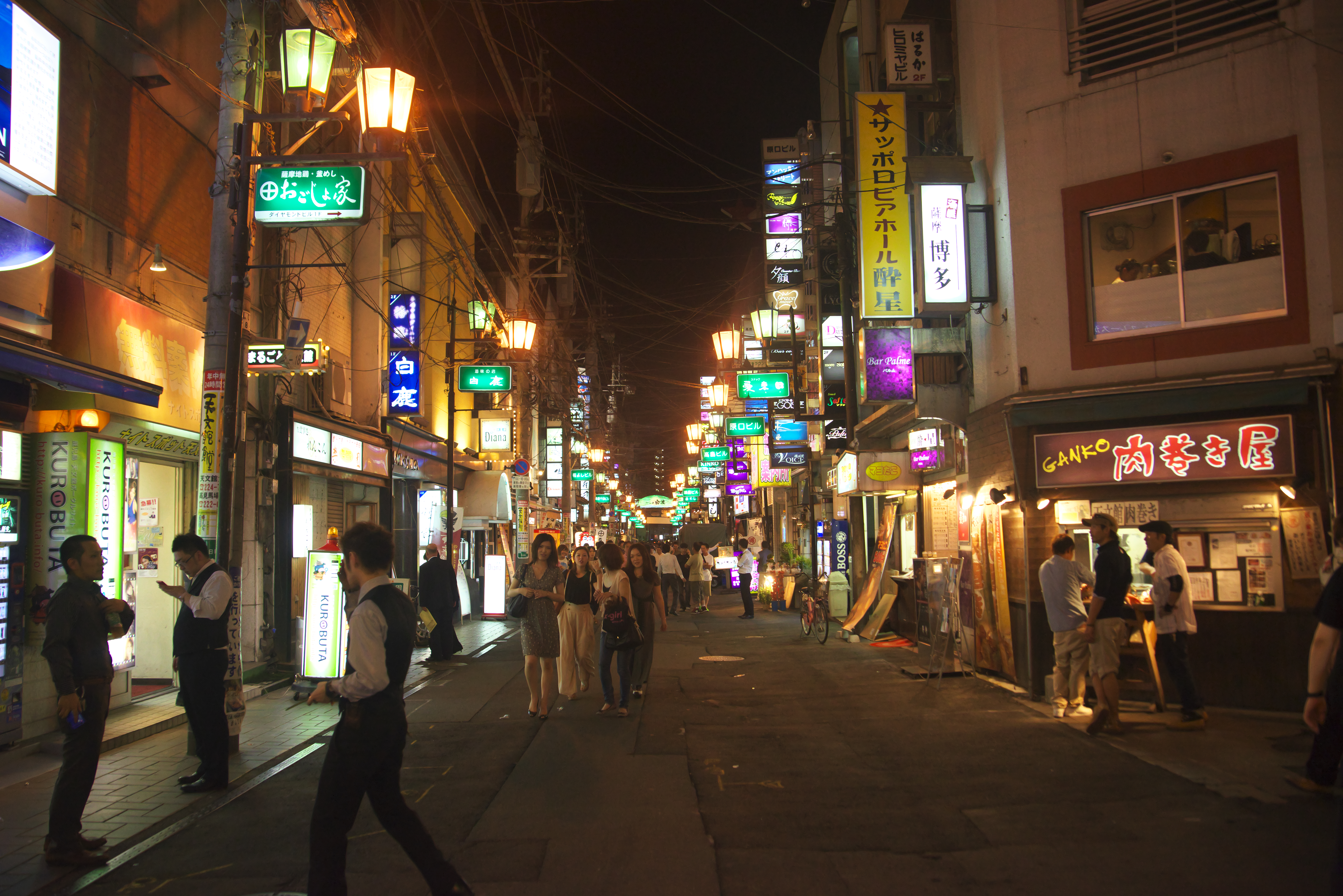 鹿児島県鹿児島市の繁華街天文館の夜の様子。